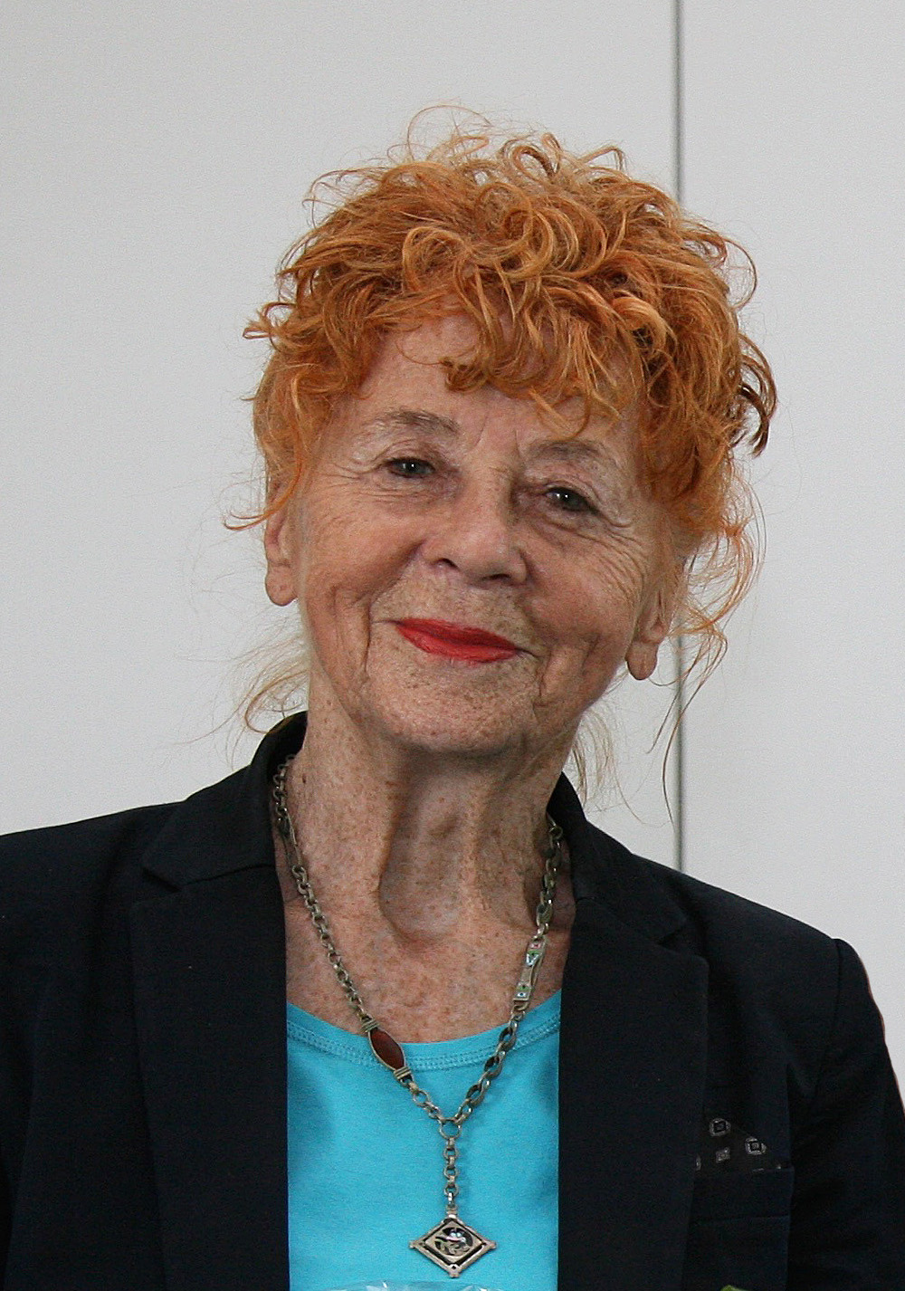 Porträt Herlinde Koelbl